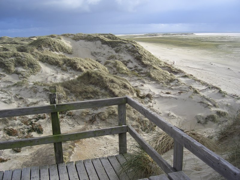 Kniepsand auf Amrum